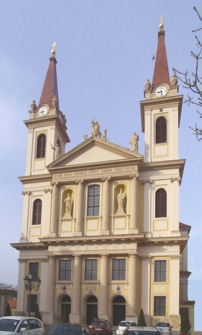 Szombathelyi Székesegyház megújult homlokzata